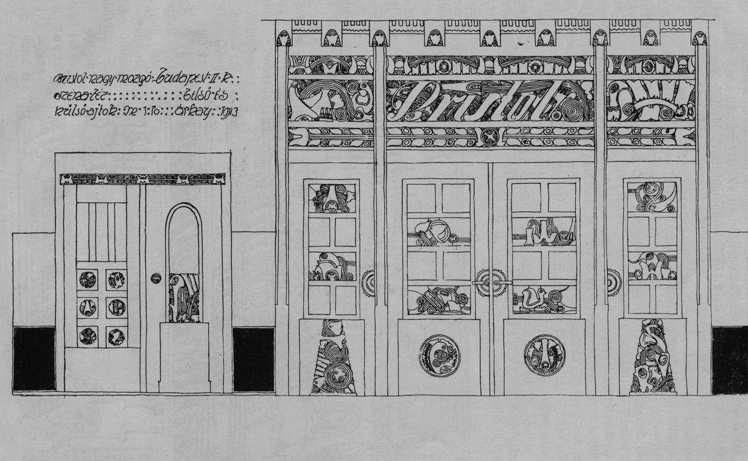 Szénatéri mozgókép szinház terve